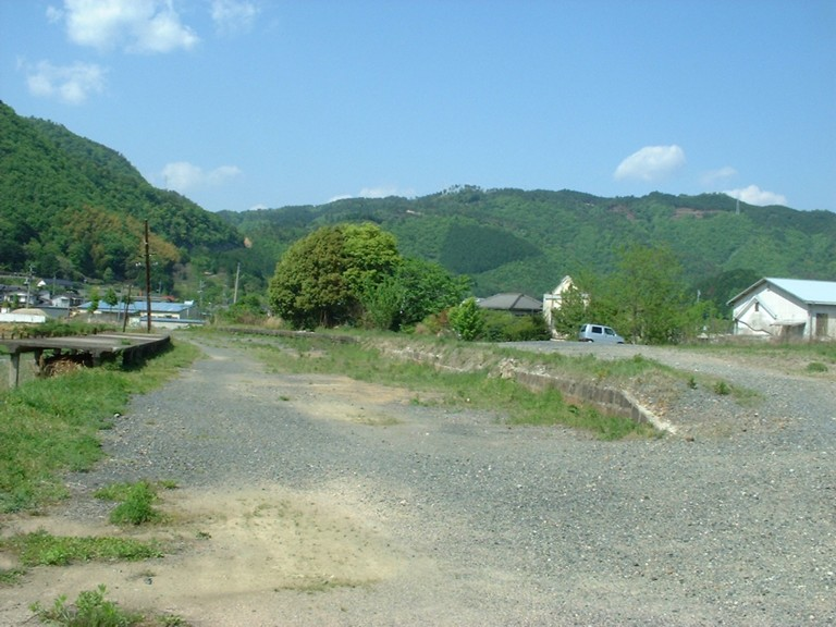 同和鉱業片上鉄道 美作飯岡（みまさかゆうか）駅跡 岡山県久米郡美咲町（撮影当時は久米郡柵原町）飯岡